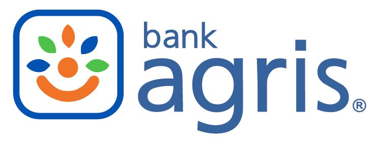 Logo Bank Agris